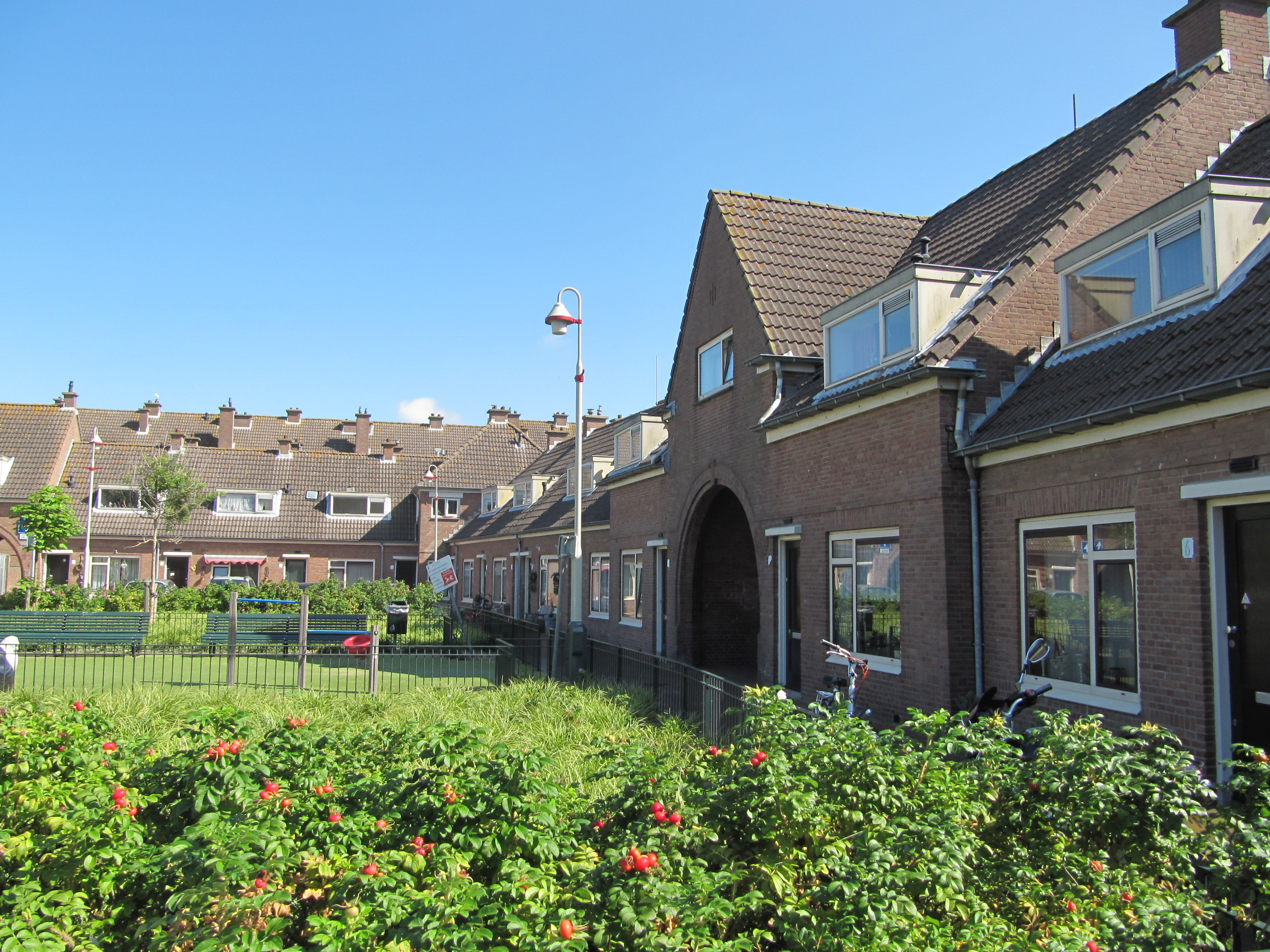 RM488303 Den Haag - Zeezwaluwhof binnenring.jpg